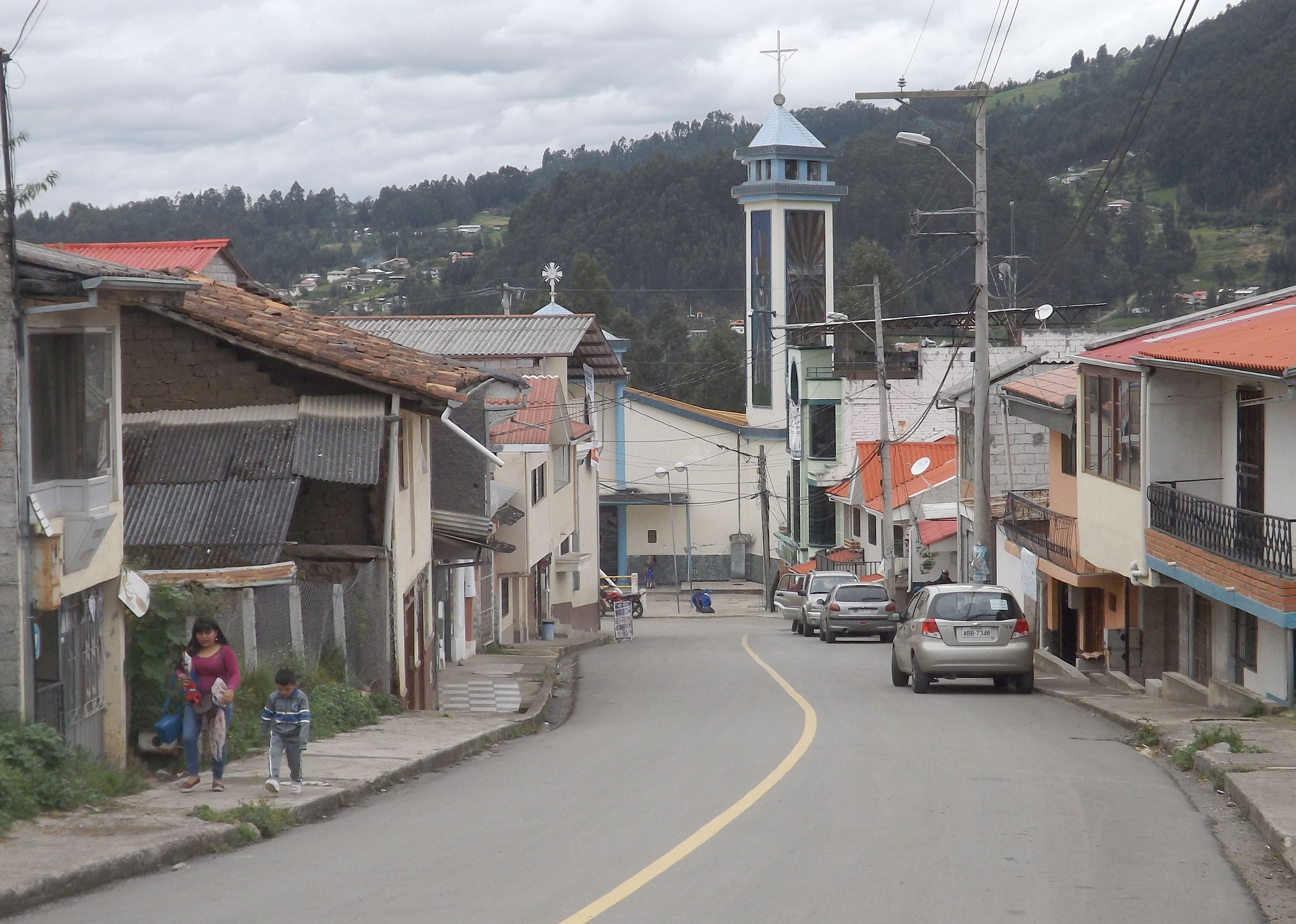 Vista de la iglesia de la Parroquia Checa